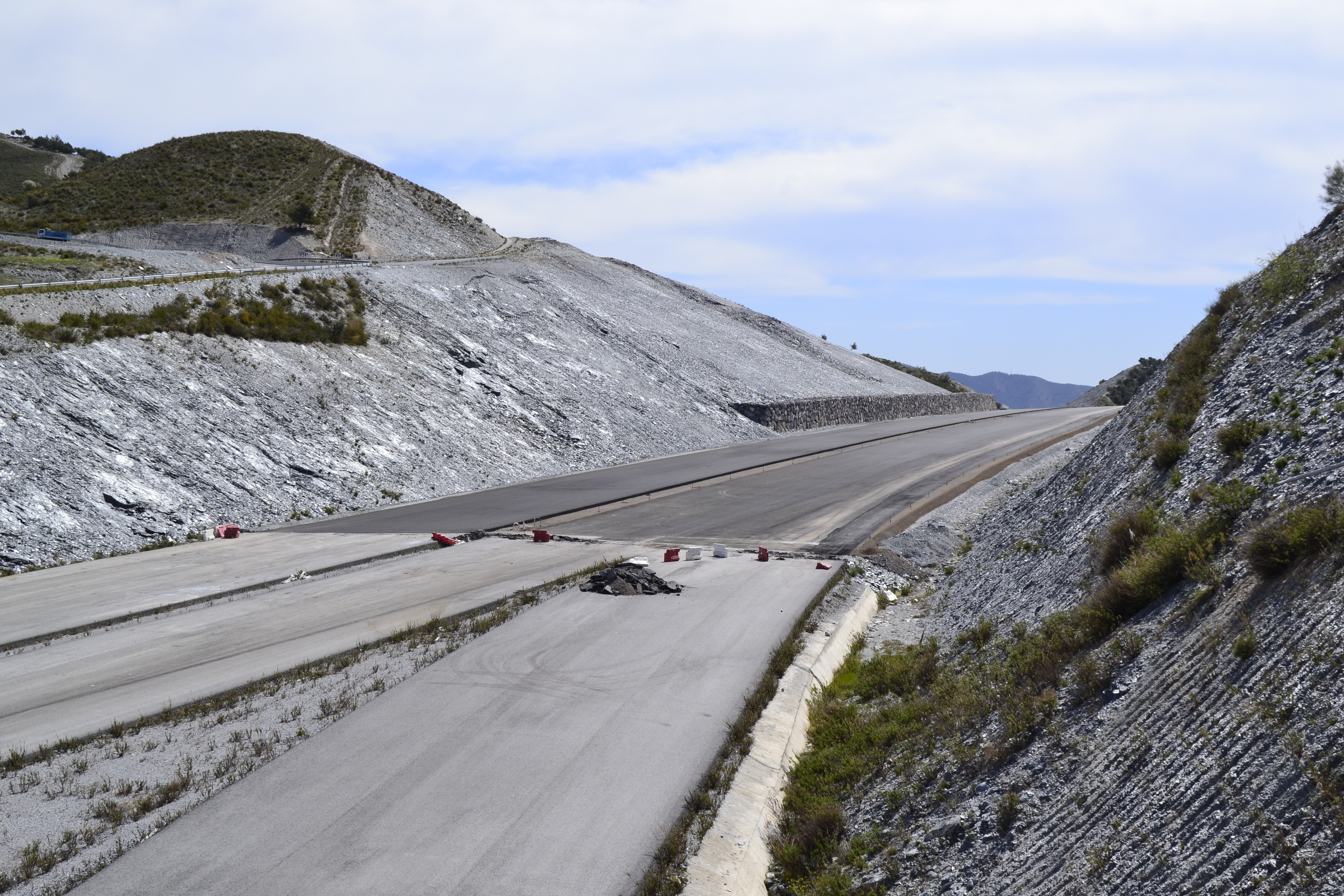 Tramo en obras de la A-7 cerca de Motril.